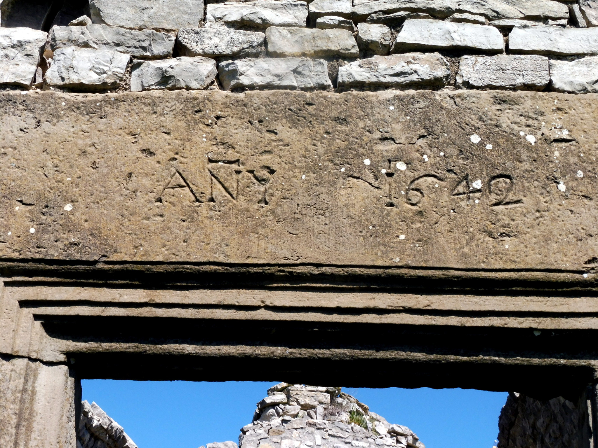 Capella de Santa Eugènia de Goberna (Sant Mateu de Bages): llinda de la portada